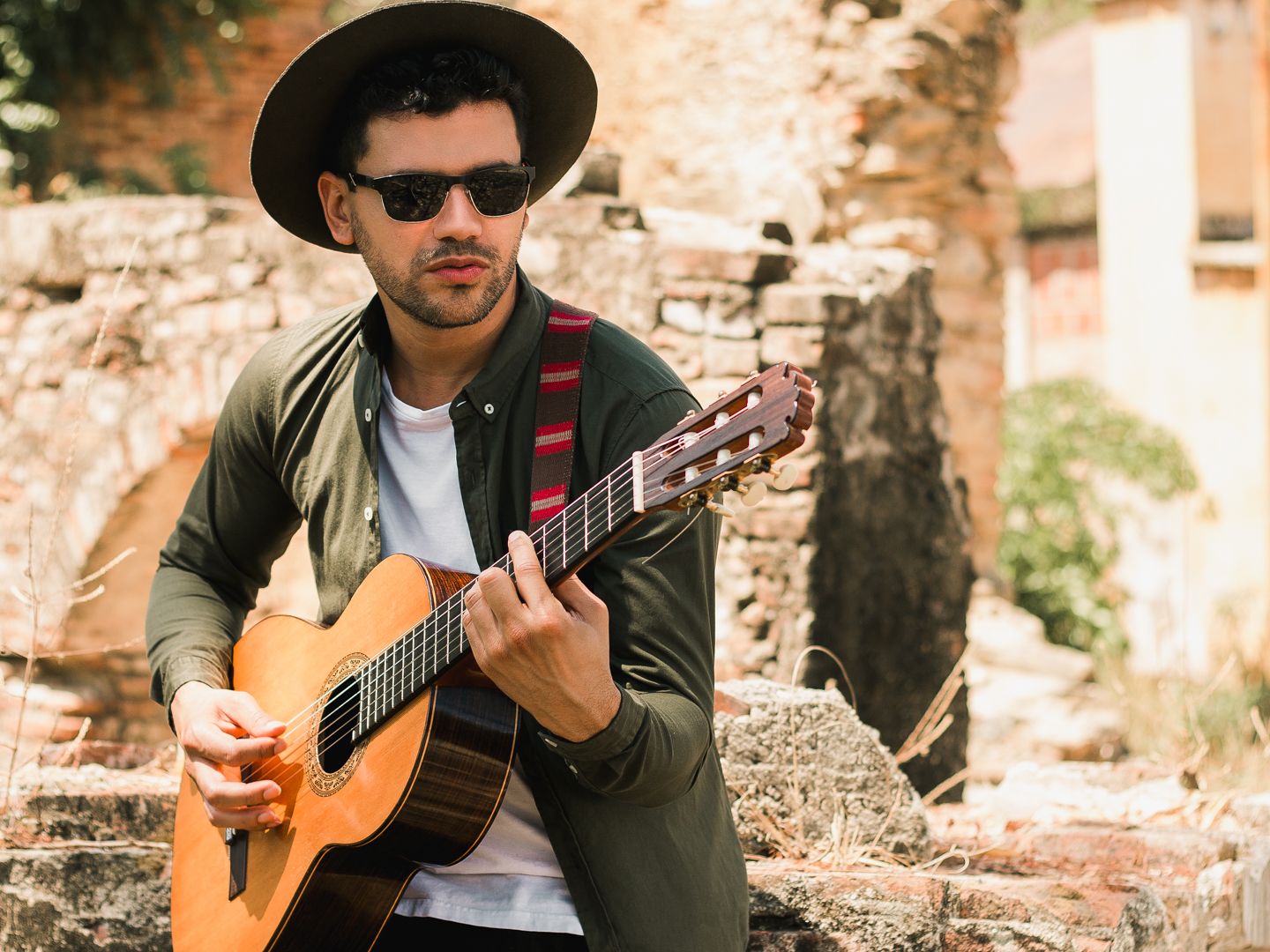 José Delgado, cantautor Venezolano